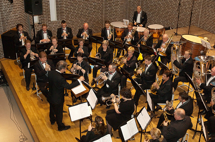 Muziekvereniging Wilhelmina Eindhoven, opname 17 april 2010, Muziekschool Eindhoven